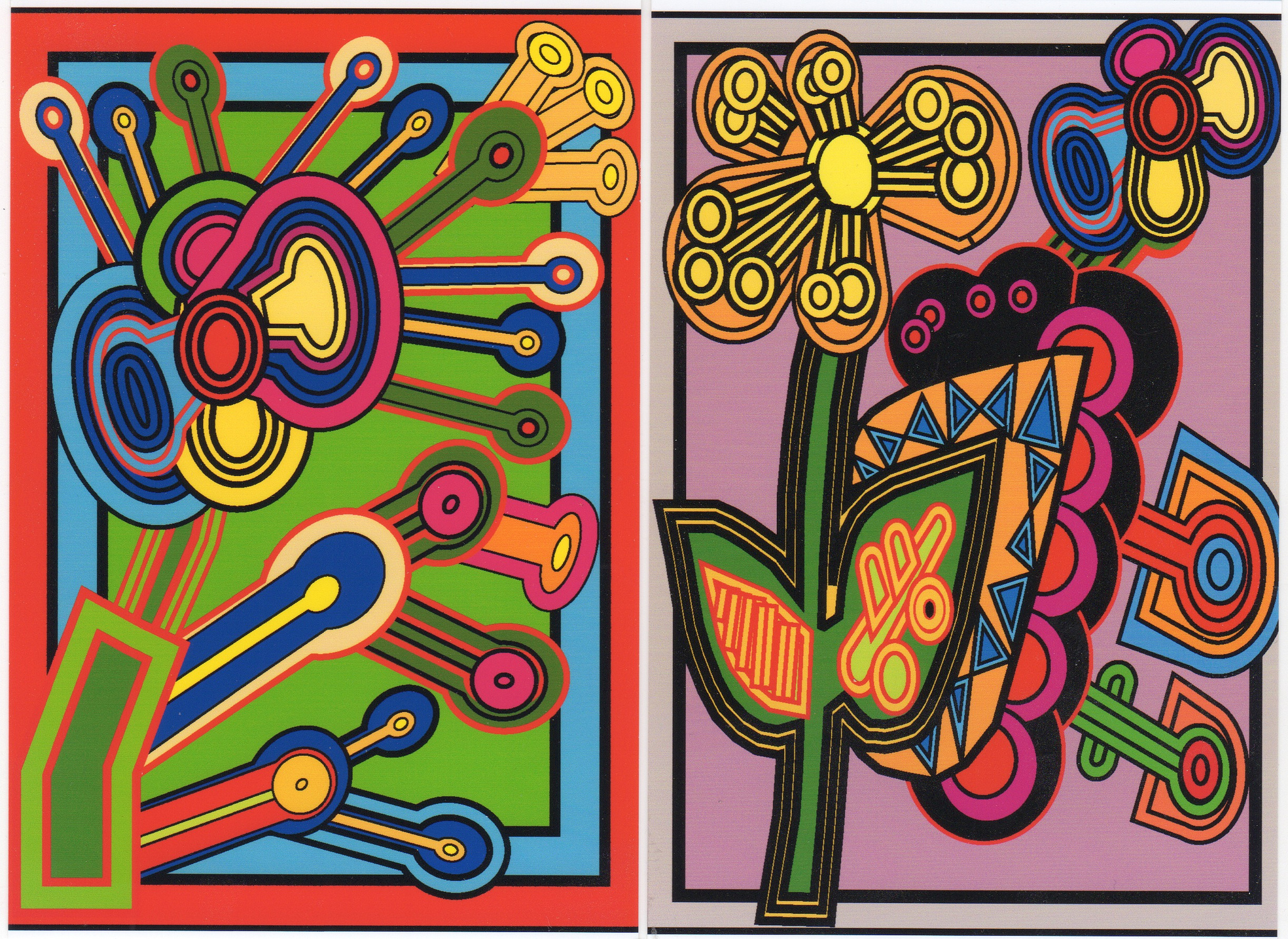 Fleurs géométriques, oeuvre de Francis Bernard